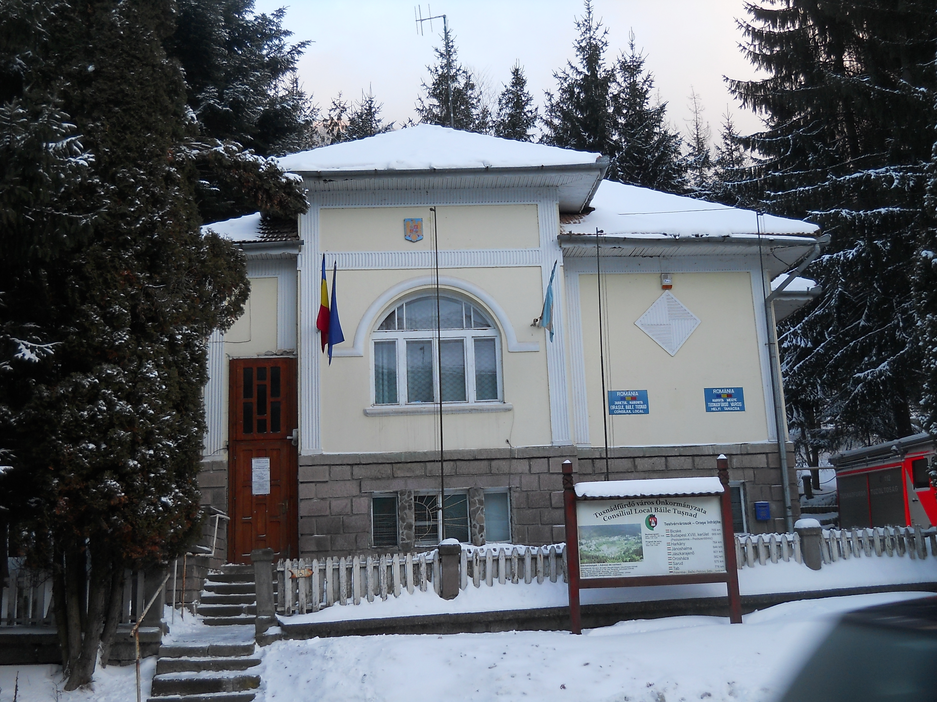 primăria oraşului Băile Tuşnad